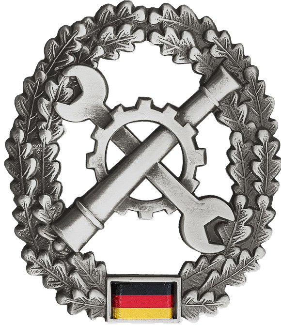 Barettabzeichen der Instandsetzungstruppe der Bundeswehr Barettfarbe: Korallenrot Maße: Hoch: 53mm Breit: 46mm Ausführung: altsilber, Metall